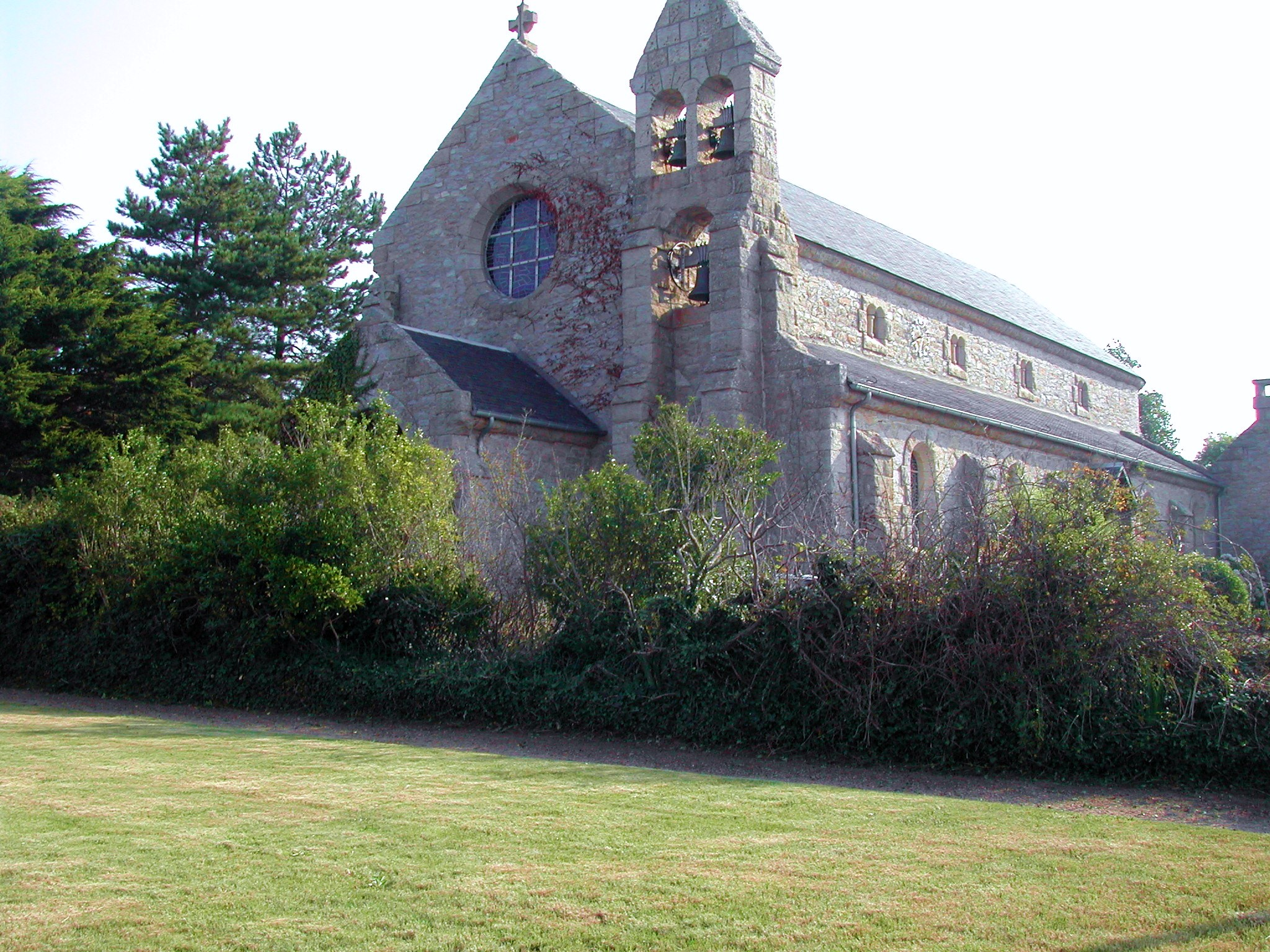 L'église Saint Marc Île-Grande quartier de Pleumeur-Bodou dans les Côtes-d'Armor Bretagne